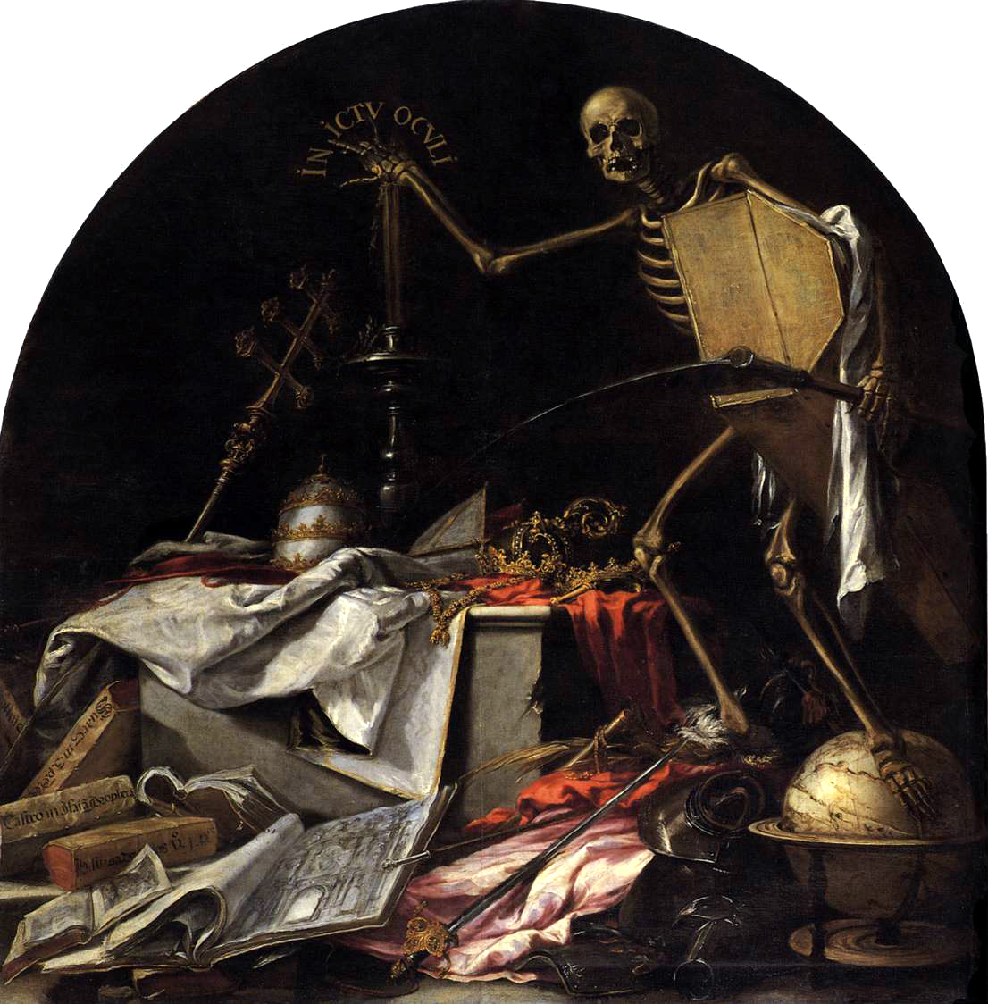 Esta obra, junto con la que lleva por título Finis Gloriae Mundi, le fue encargada a Juan de Valdés Leal para ser colocada en el sotocoro del Hospital de la Caridad de Sevilla, y al igual que en las pinturas del género Vanitas, aluden a la banalidad de la vida terrena y a la universalidad de la muerte, aunque también quedan unidas con el fin primordial de la Hermandad de la Caridad de Sevilla, que era el de enterrar a los ajusticiados e indigentes de la ciudad, al igual que otras hermandades similares existentes en España en esa época.